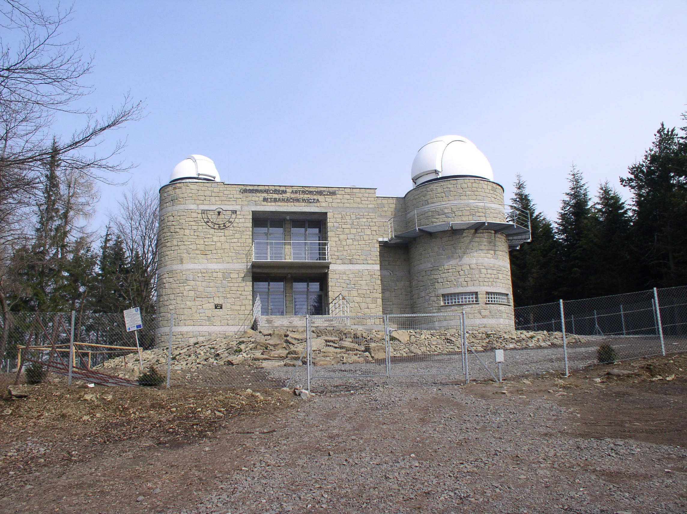 Obserwatorium Astronomiczne im. Tadeusza Banachiewicza na Lubomirze